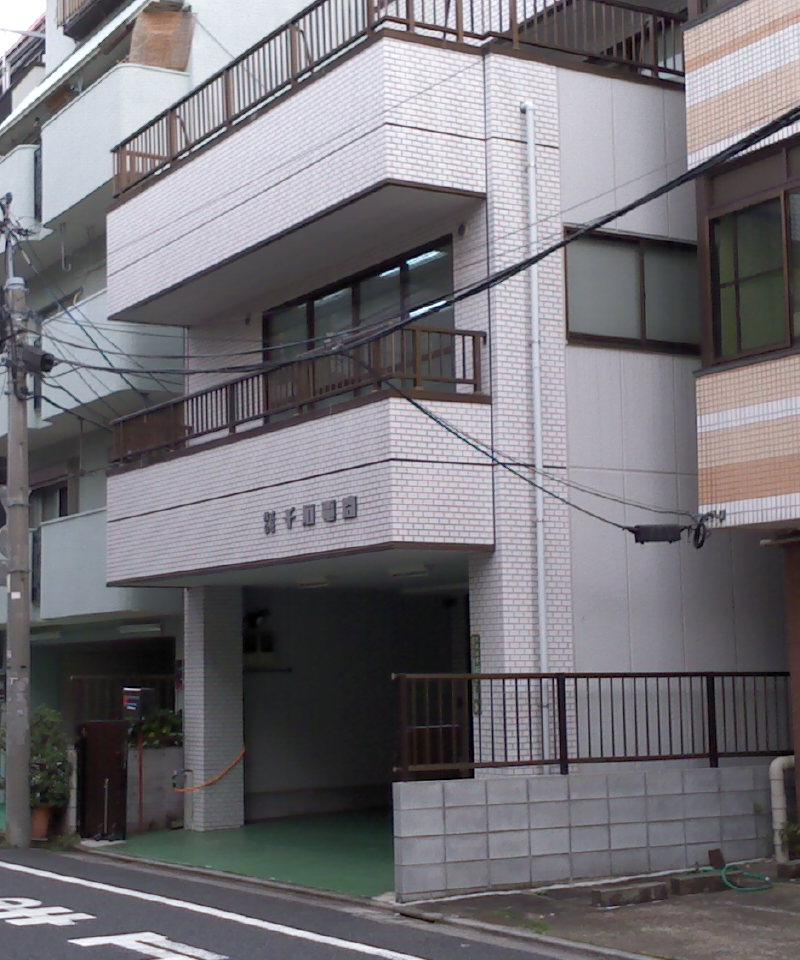 2014年11月5日, 文京区千石にて撮影した千石電商周辺の住宅街の写真の一部を切り取り出したもの。